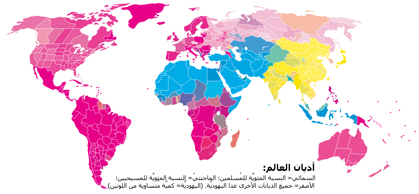 خارطة تُظهر توزُّع وانتشار الديانات في العالم وفق الدولة \ الولاية، وبعض التقسيمات الإداريَّة الأصغر في الدُول الأكبر مساحة (الصين، الهند، روسيا، الولايات المُتحدة). نسبة اللون السمائي تُشيرُ إلى عدد مُعتنقي الإسلام، ونسبة اللون المجانتيي تُشيرُ إلى عدد مُعتنقي المسيحيَّة، أمَّا اللون الأصفر فيُشير إلى مُعتنقي البوذيَّة والهندوسيَّة والأديان الصينيَّة وتلك التقليديَّة.